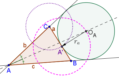 Полупериметар и надворешна кружница